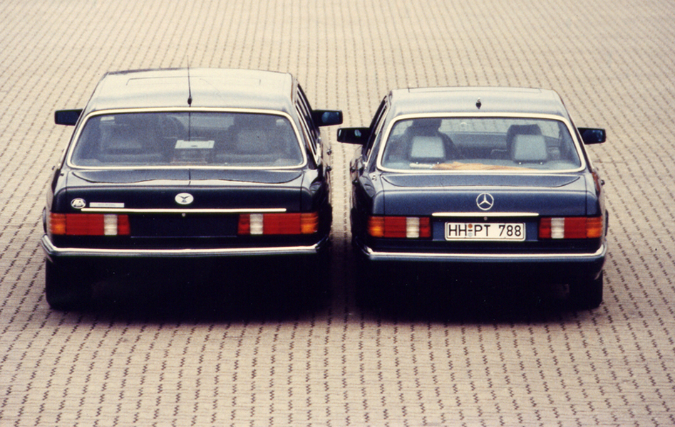 600-SGS-Royal und regulärer Mercedes-Benz S-Klasse (W126) im Vergleich